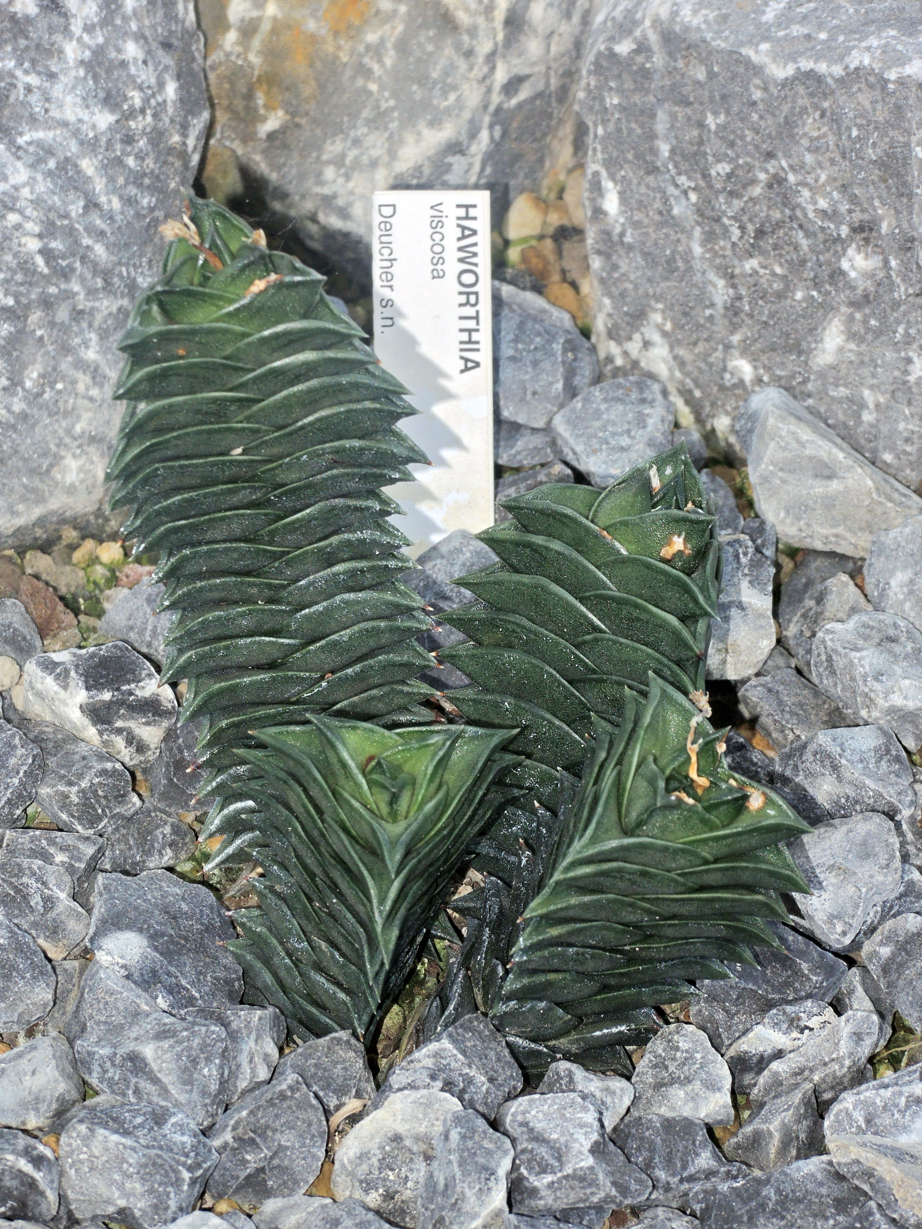 Sukkulenten-Sammlung Zürich, Mythenquai in Zürich